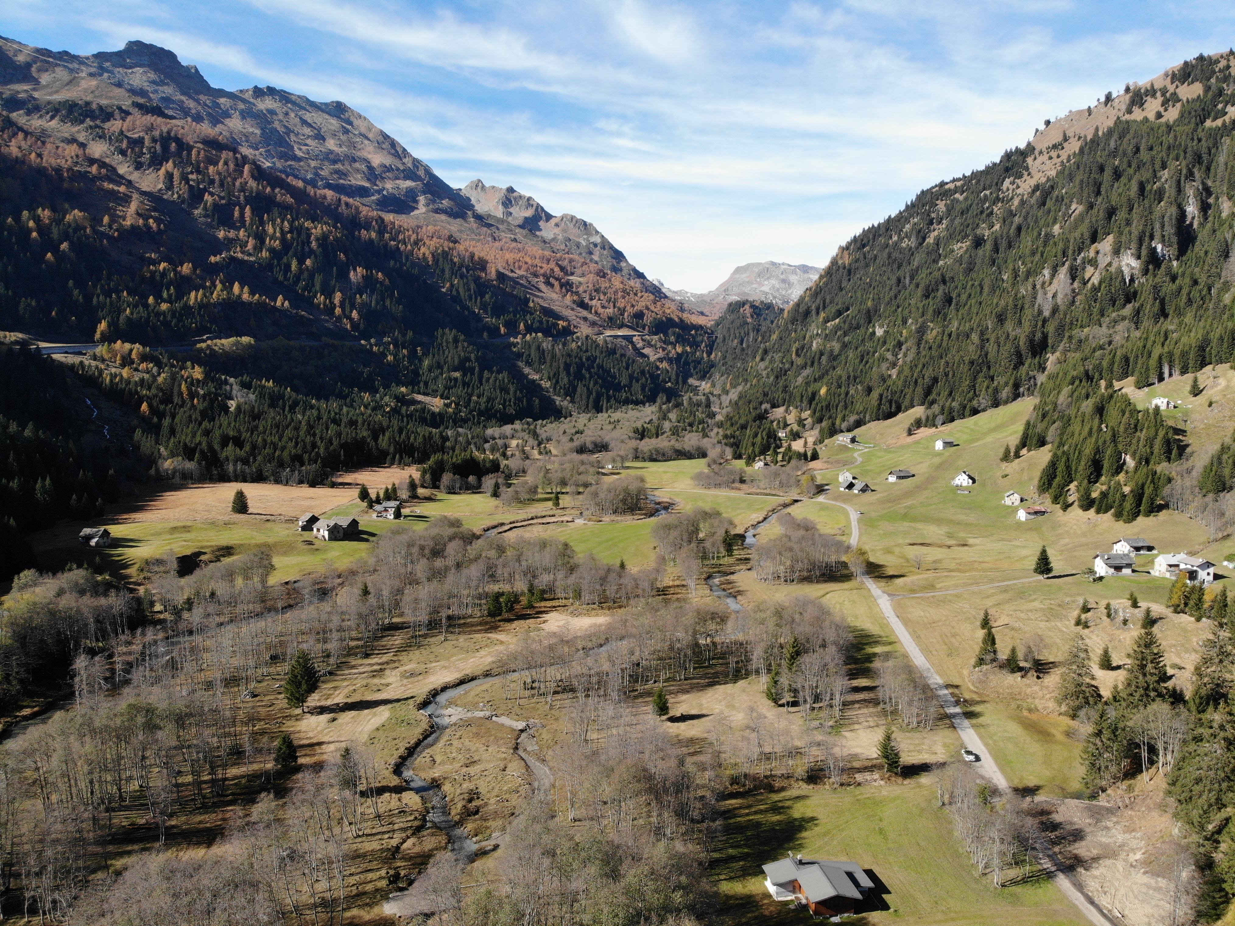 Valle di Blenio, westlich von Campra, nach Westen